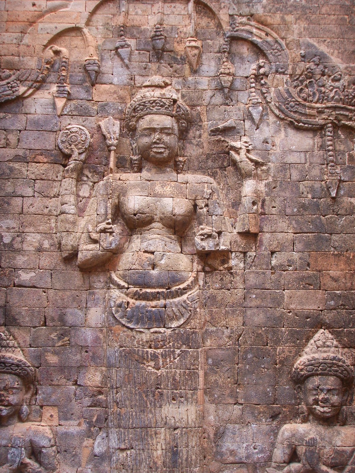 中文（台灣）: Vishnu 的妻子 Lakshmi